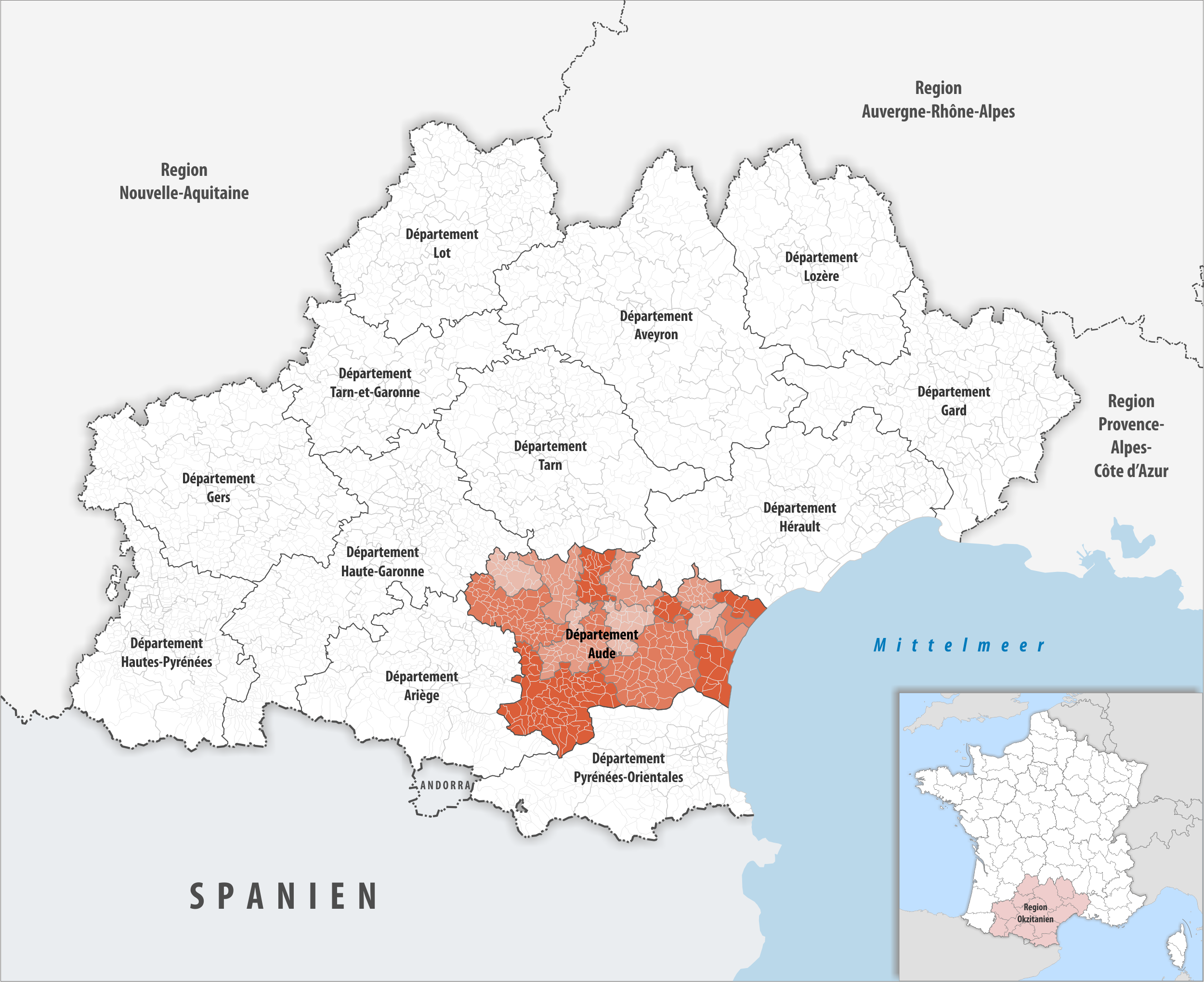 Lage des Departements Aude